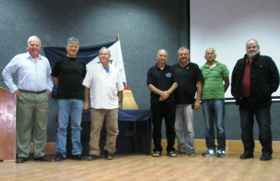 ותיקי צוות אח"י קשת מספרים על קרבות הטילים במלחמת יום הכיפורים לקדטים בבית הספר לקציני ים עכו